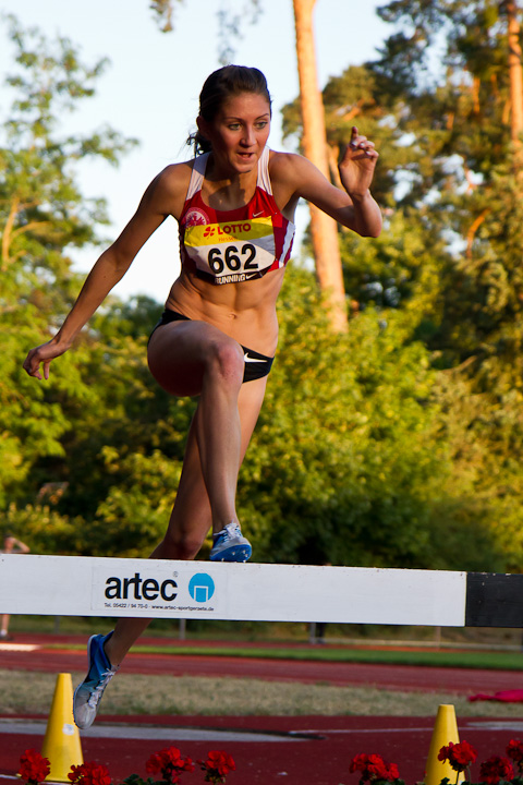 Gesa Felicitas Krause bei den Hessischen Hindernis-Meisterschaften 2011 in Pfungstadt